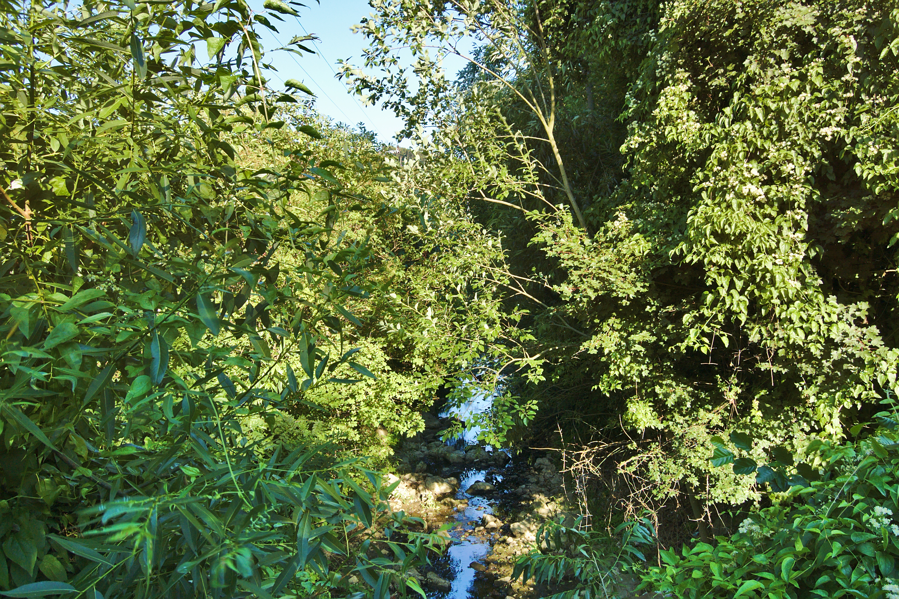 Potok Klanečnice, Květná, Strání, okres Uherské Hradiště